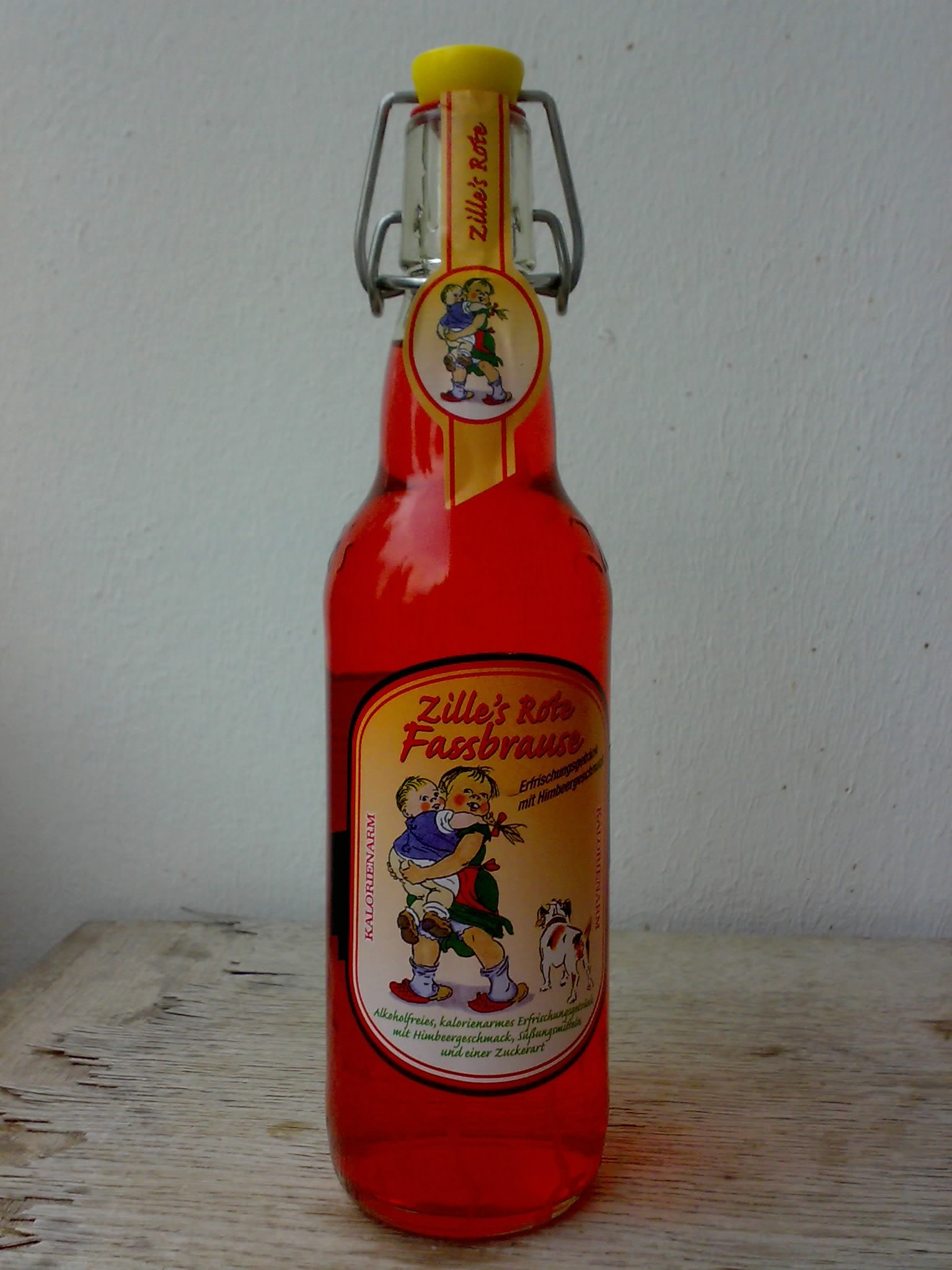 Zille´s Fassbrause mit Bügelverschluss